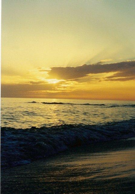 Pensacola Beach at sunset